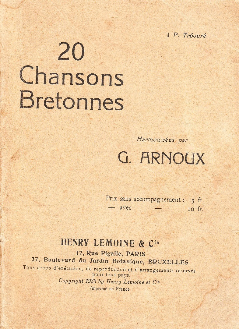 20 kanaouenn eus Breizh, 16 anezho e brezhoneg. Embannet e Paris e 1933.